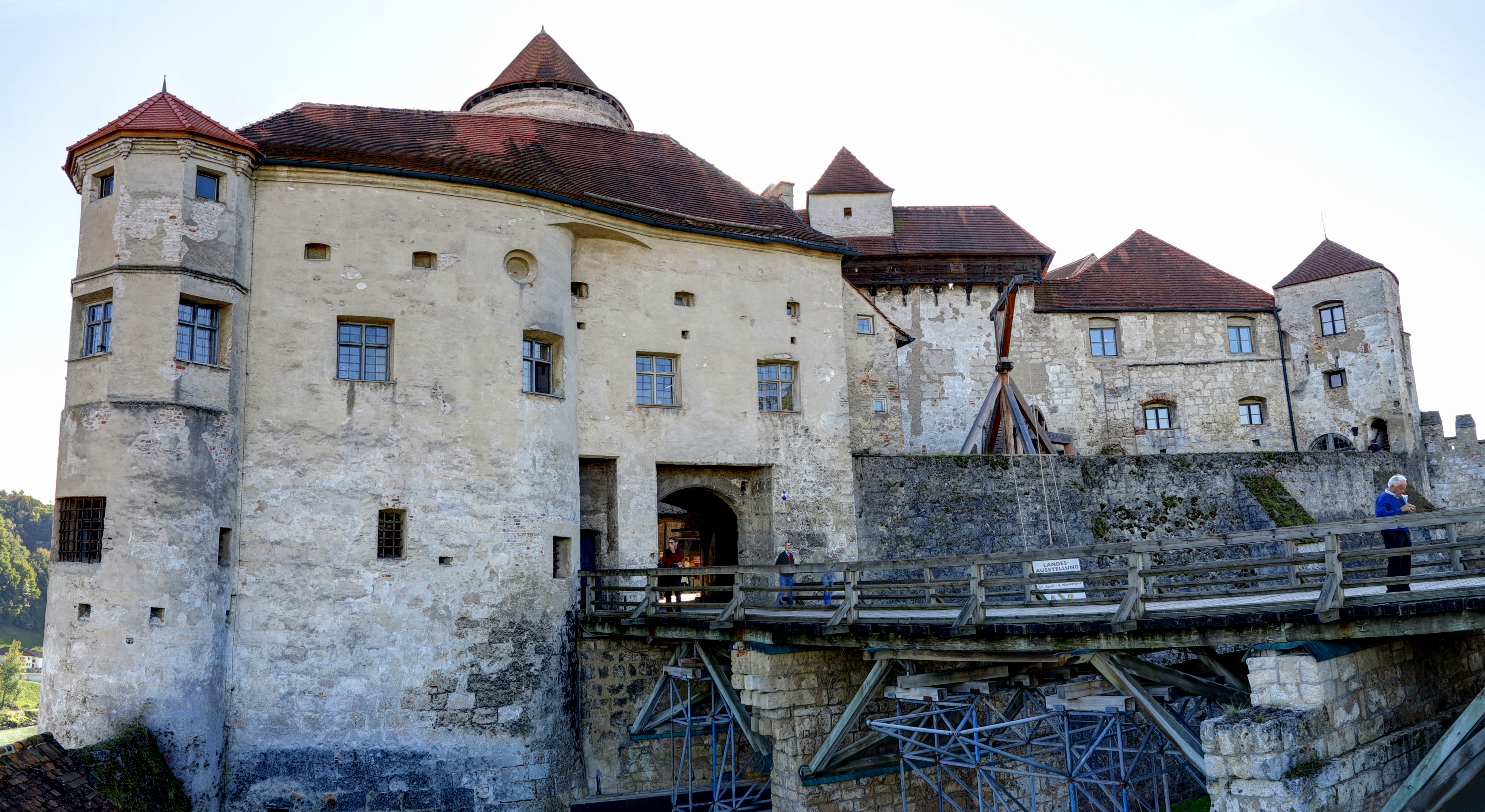 Deutschland, Bayern, Oberbayern, Burghausen, Burg von Burghausen, Hauptburg